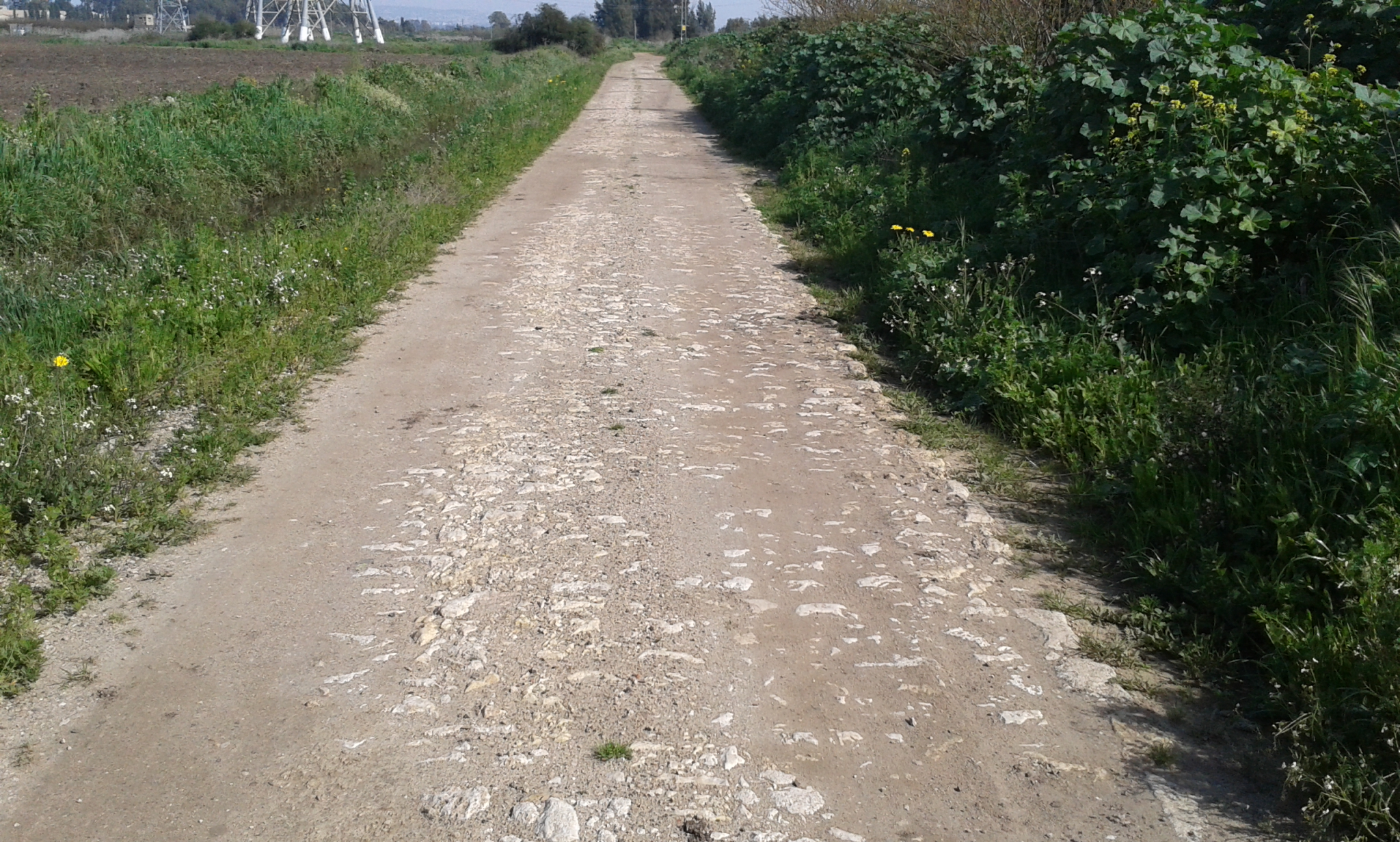 דרך סולינג מצפון לחדרה - בקרבת תחנת הרכבת חדרה מזרח